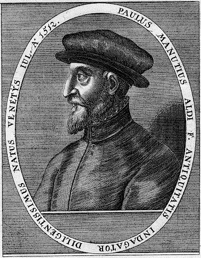 Jean-Jacques Boissard, Il tipografo e umanista Paolo Manuzio (1512-1574). Incisione da: Bibliotheca calchografica [1652-1669].